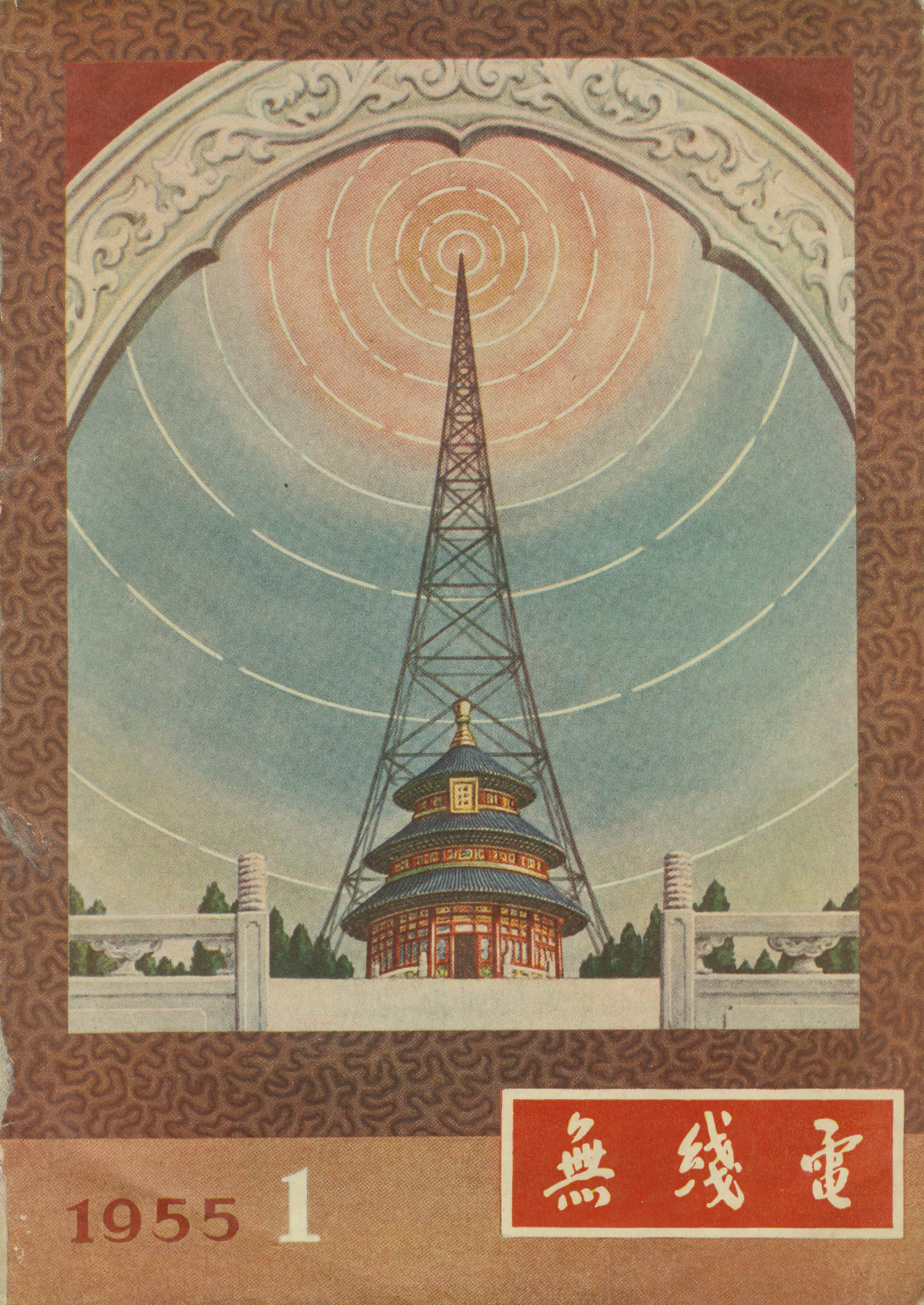 中文（中国大陆）: 《无线电》杂志创刊号